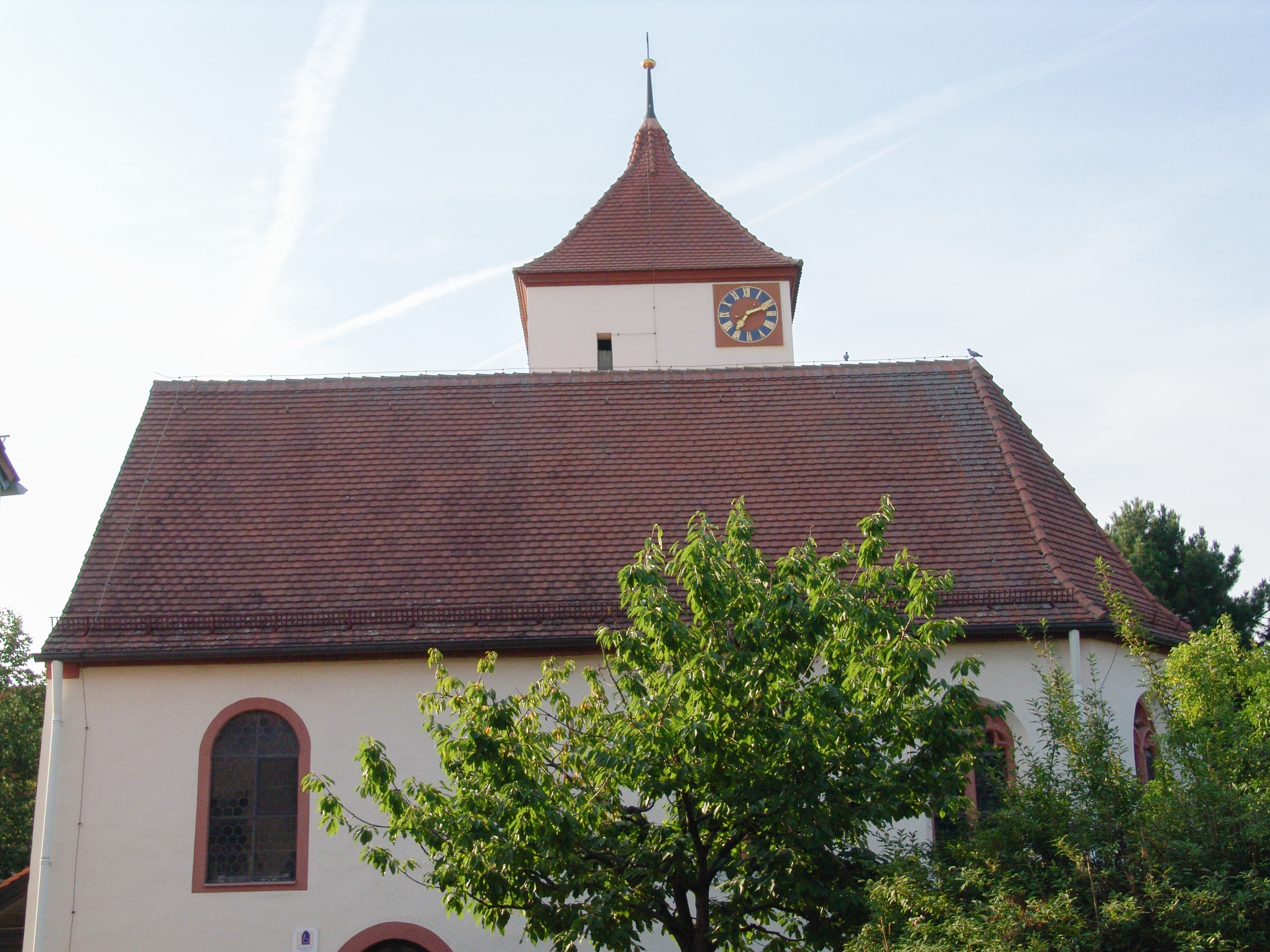 Evangelische Kirche in Würzburg Rottenbauer